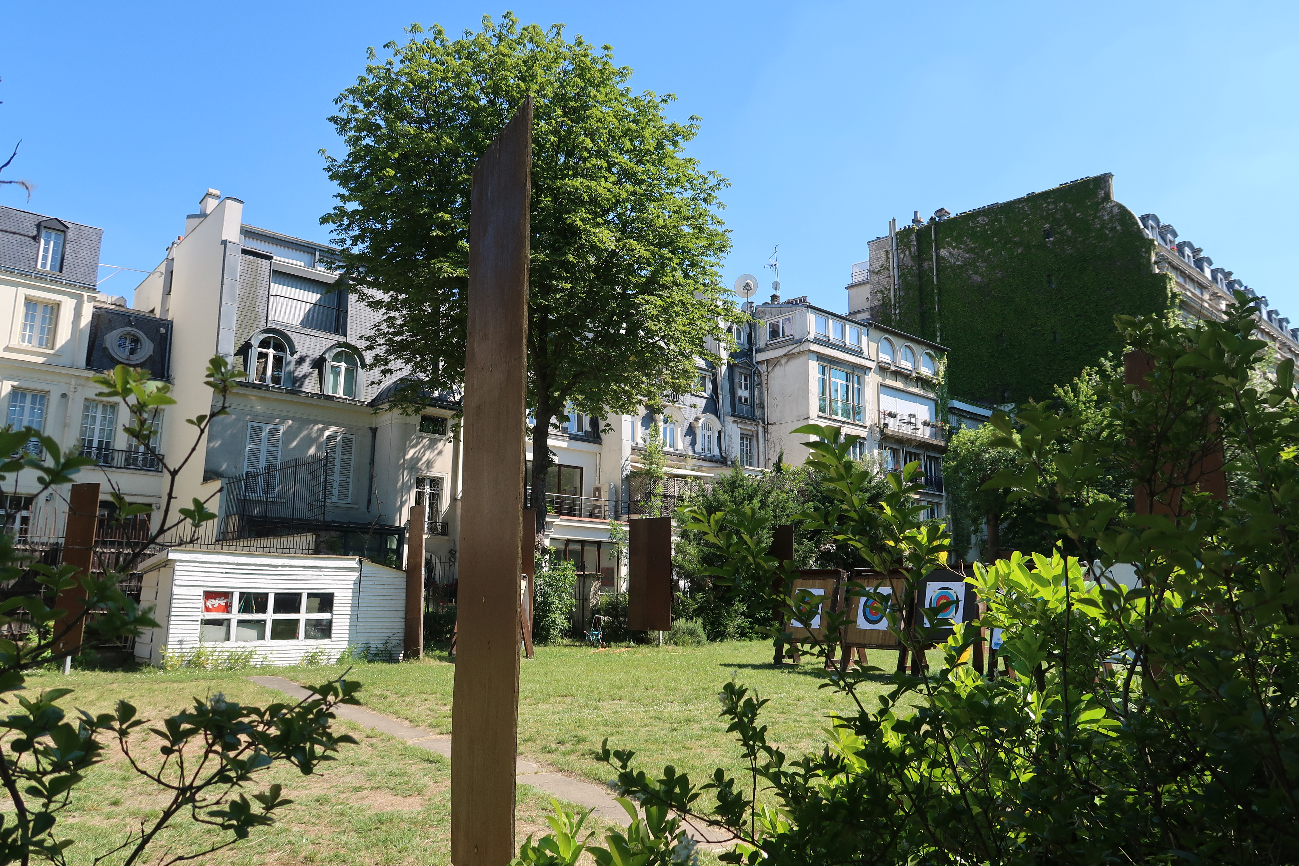 Les Archers de Paris, 53 boulevard de l'Amiral Bruix (Paris, 16e).